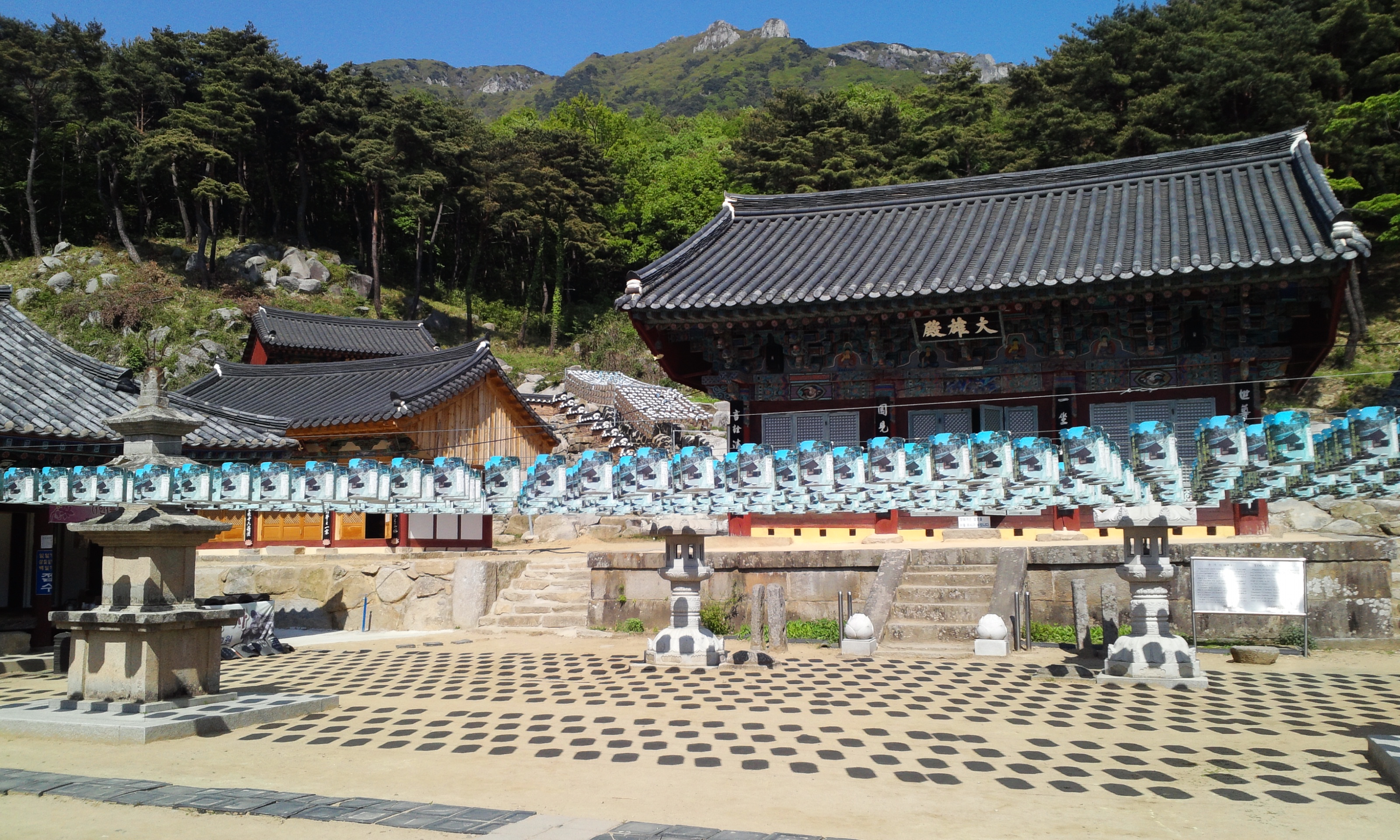 유가사 대웅전 뜰에서 촬영.